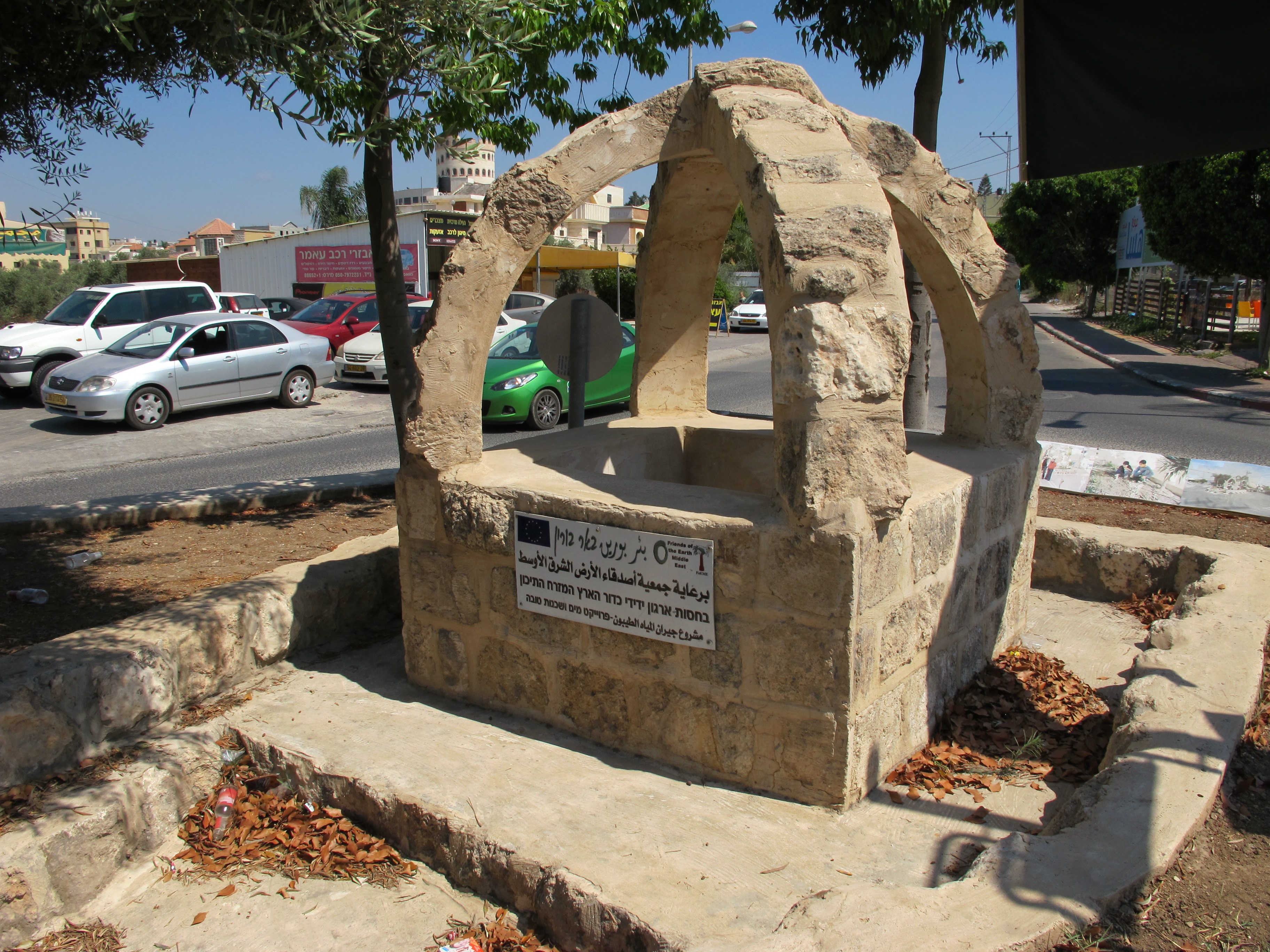 באר בורין, באר מים בעומק 12 מים ששרתה את חקלאי באקה אל גרביה עד שנות ה-50